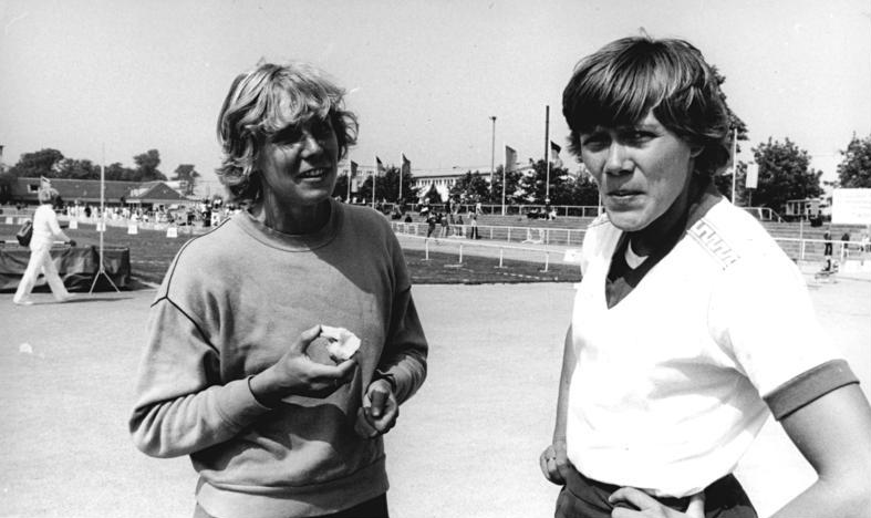 Anke Vater und Sabine Pätz ADN-ZB Bartocha 22.5.83 Neubrandenburg: DDR-Meisterschaften im Leichtathletik-Mehrkampf - Mit sehr guten 6515 Punkten verteidigte die Neubrandenburgerin Anke Vater (l.) ihren Siebenkampf-Titel von 1982.Sie übertraf damit ihre persönliche Bestleistung um 126 Zähler und nimmt nun Platz fünf in der "Ewigen"" Weltbestenliste ein. Zweite wurde Sabine Pätz (SC DHfK Leipzig- r.) mit beachtlichen 6381 Punkten.